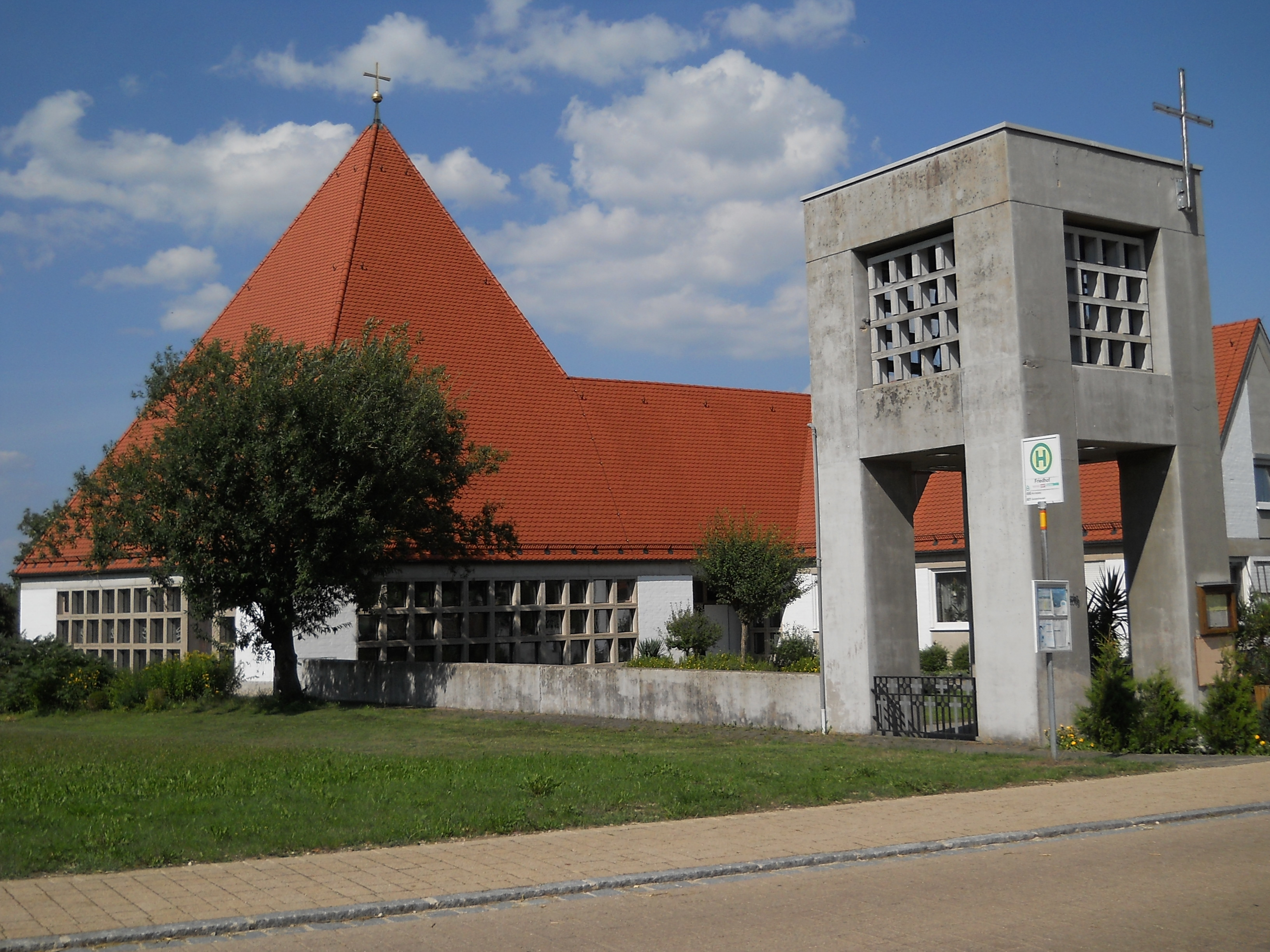 Markt Berolzheim (Landkreis Weißenburg-Gunzenhausen), Kath. Pfarrkirche St. Hedwig